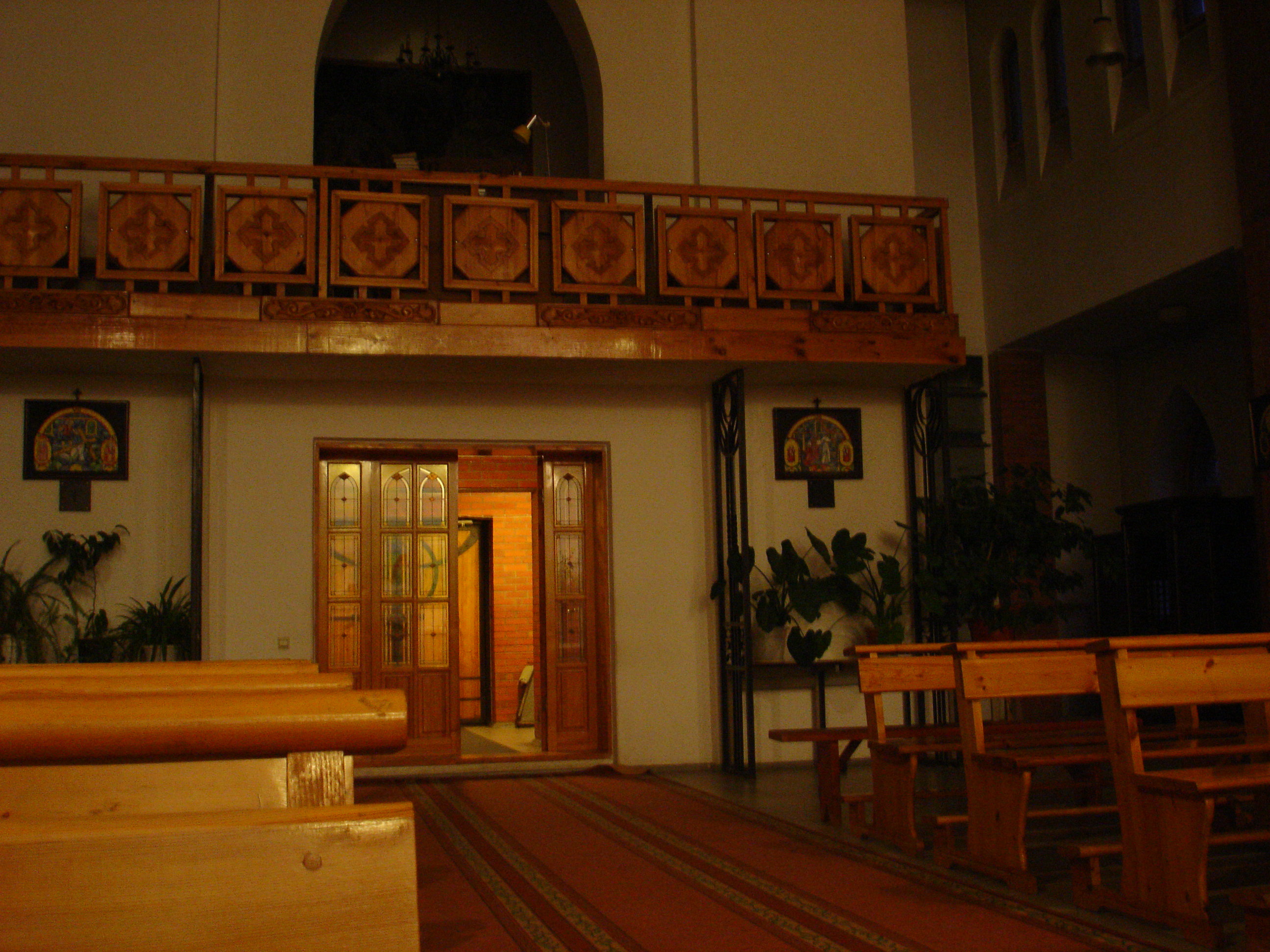 Римо-католическая церковь Святой Терезы Младенца Иисуса, Павлодар. Казахстан. Общий вид на зал.